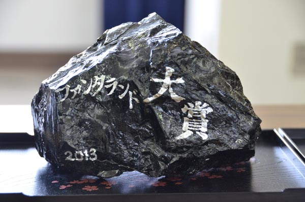 ファンタランド大賞トロフィー